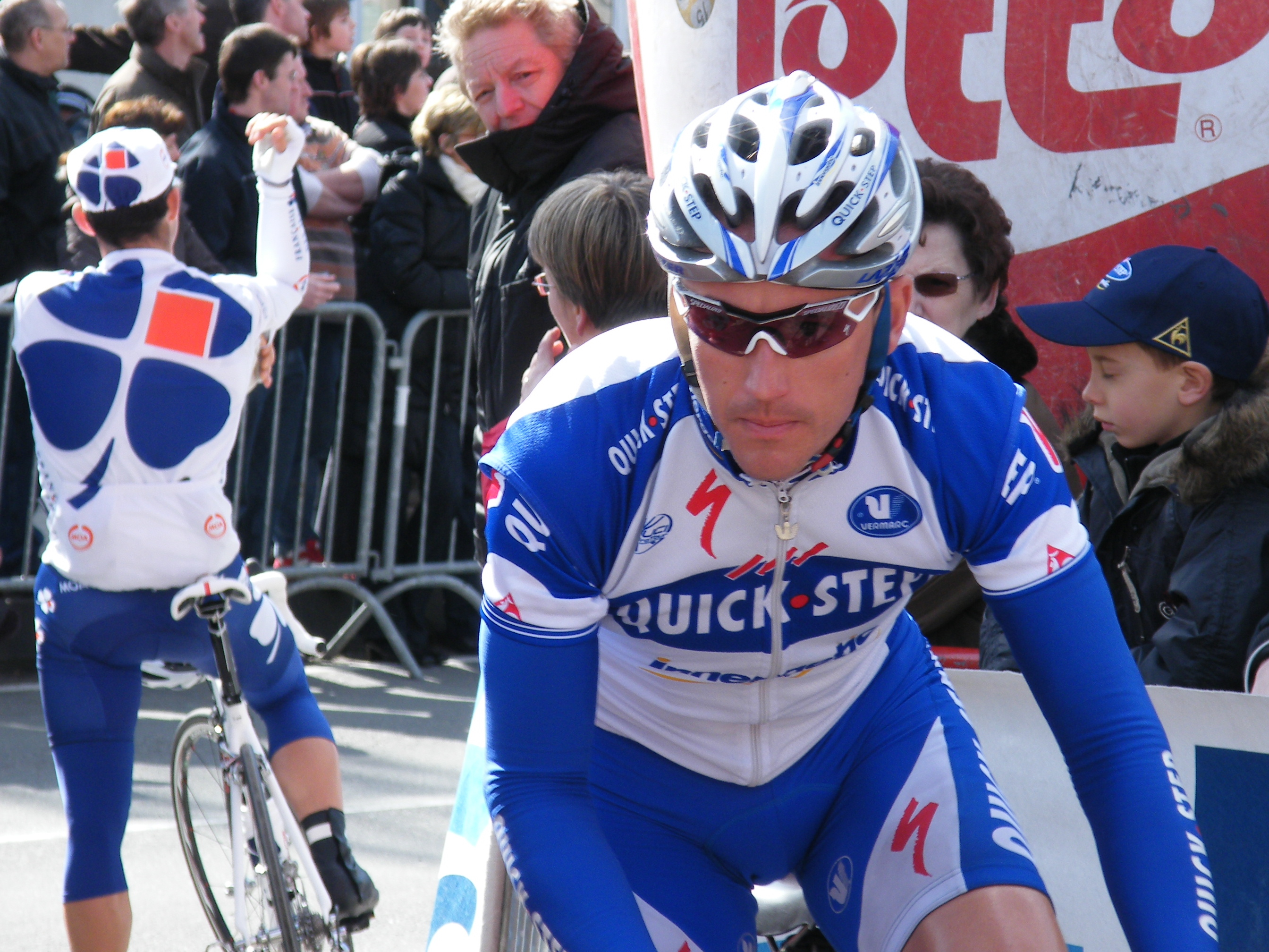 Wilfried Cretskens at the 2008 E3 Prijs Vlaanderen in Harelbeke.